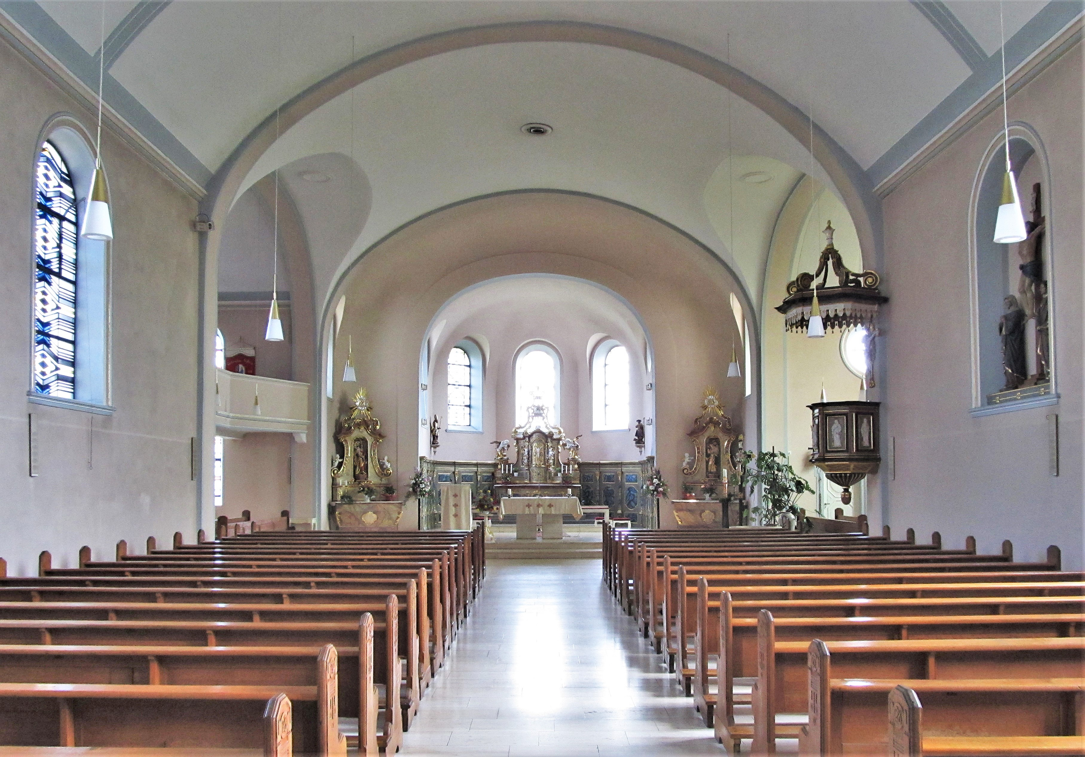 Blick ins Innere der St. Peterskirche in Ensheim, Saarland